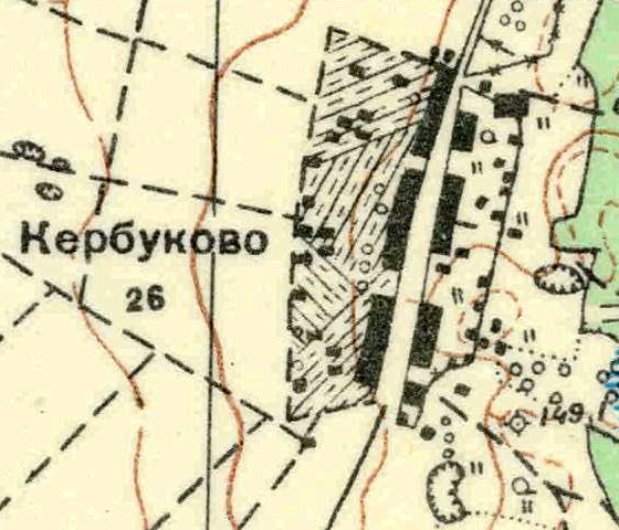 Топографическая карта Ленинградской области, квадрат О-35-11-В-в (Копорье), деревня Кербуково